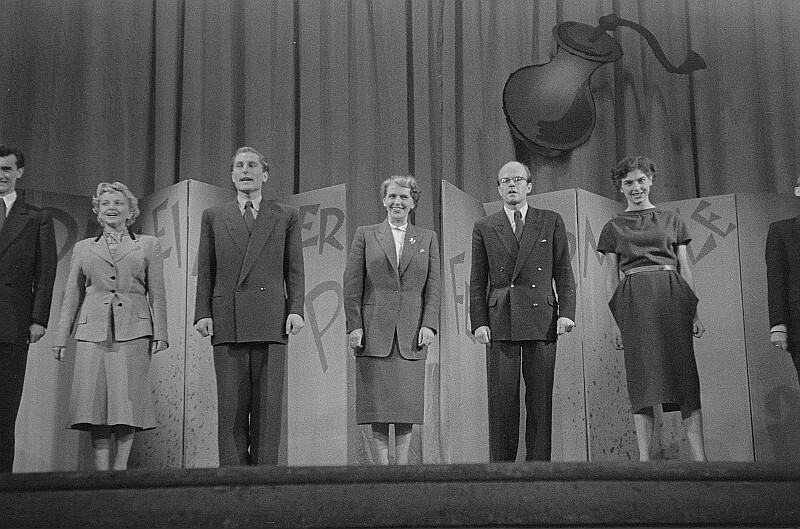 Original image description from the Deutsche Fotothek Kabarettisten der Leipziger Pfeffermühle bei ihrem Zweiten Programm im Weißen Saal